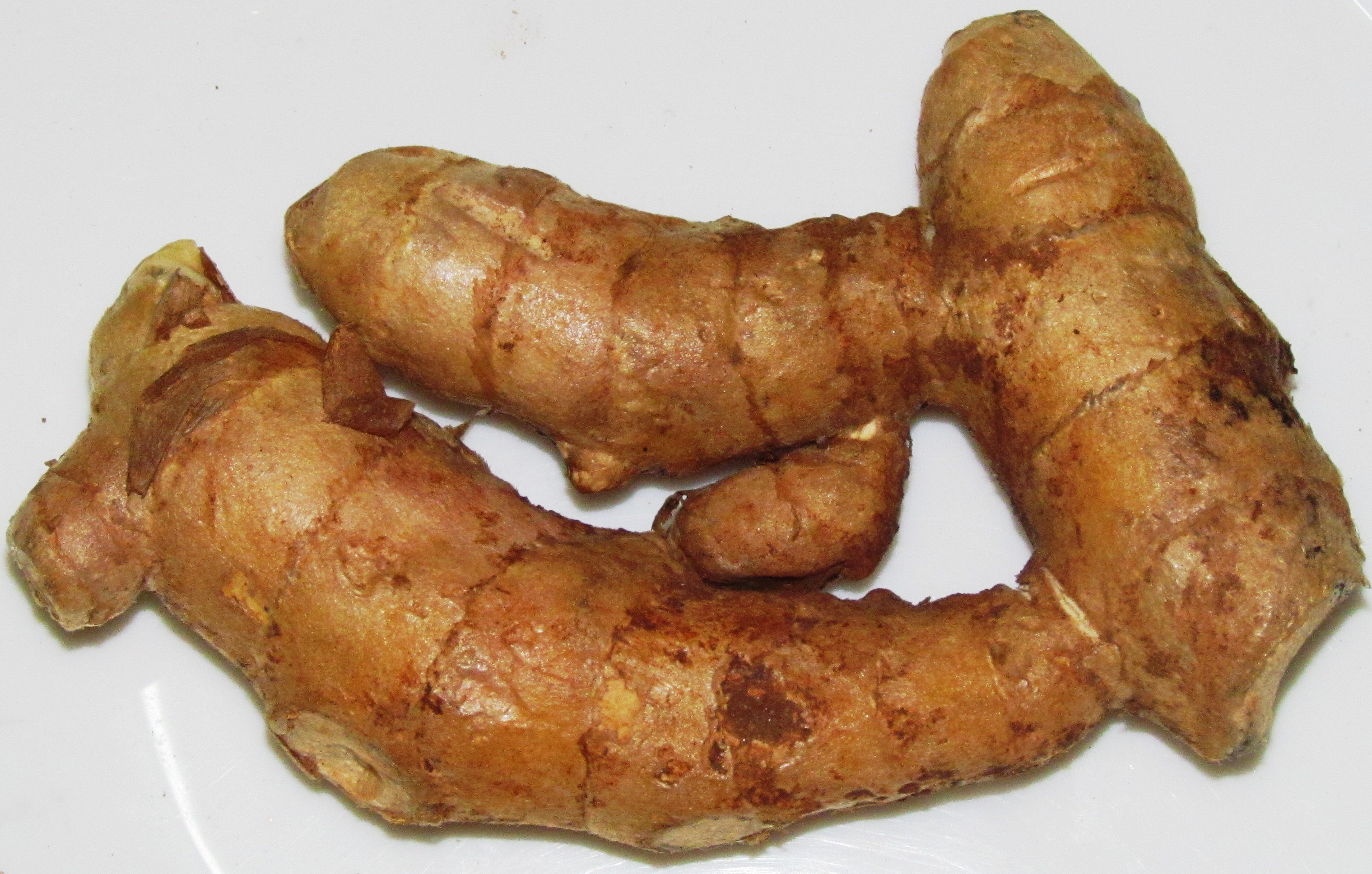 picture of curcuma amada